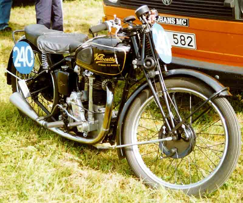 Velocette 350 cc Racer 1947